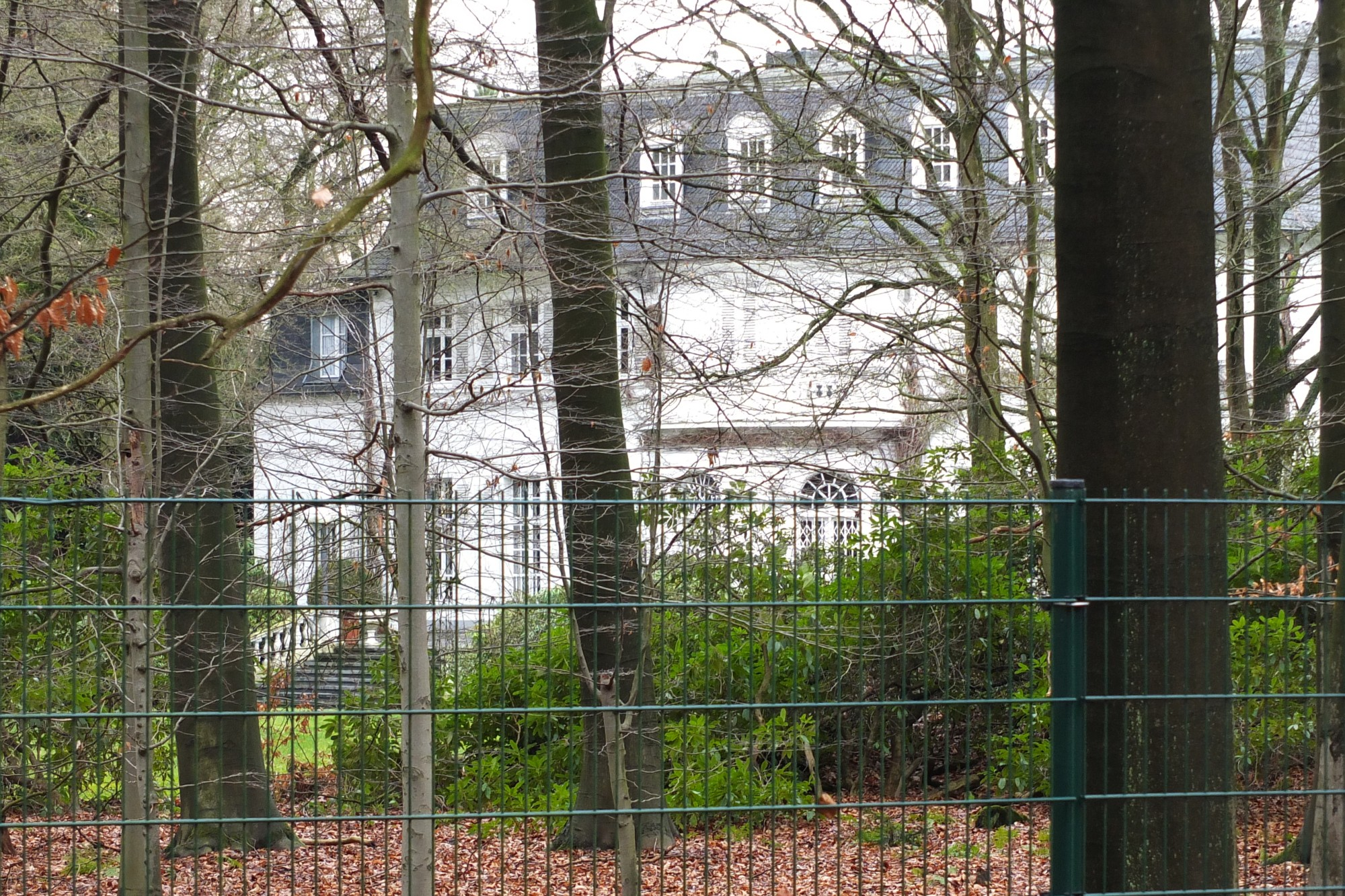 Haus Eichenhorst, Hilden, Haus Eichenhorst 4 This is a photograph of an architectural monument.